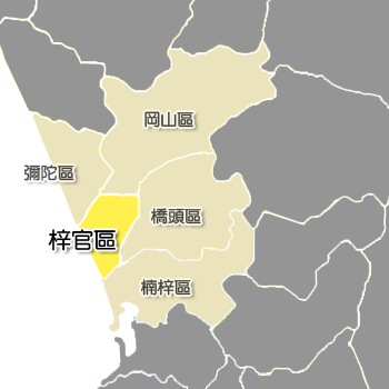 梓官區相對位置